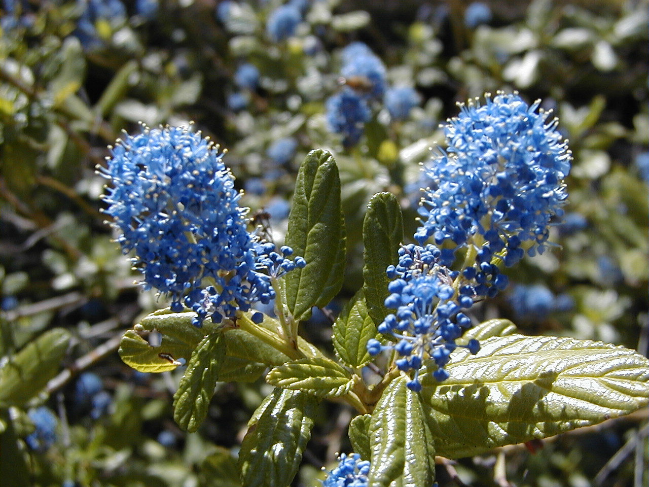 Ceanothus thyrsiflorus. Real Jardín Botánico de Madrid.